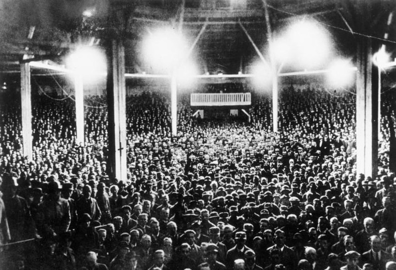 Hitler spricht!